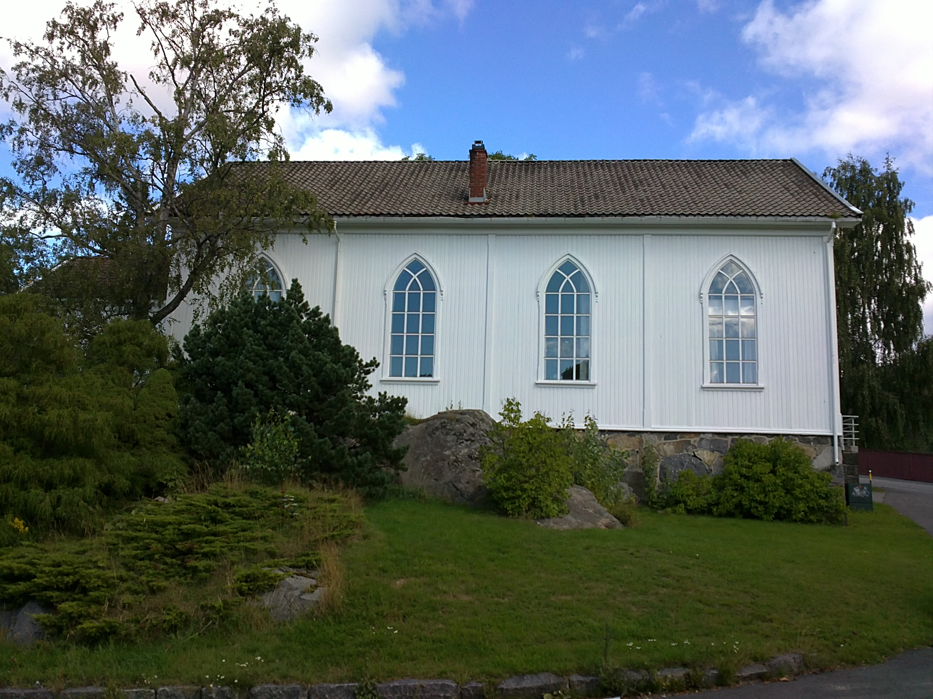 Bilde av Bedehuset, Larvik